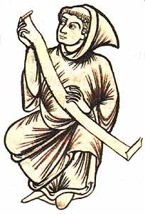 Retrato de Elredo de Rieval, obtenido de su manuscrito «De Speculo Caritatis»